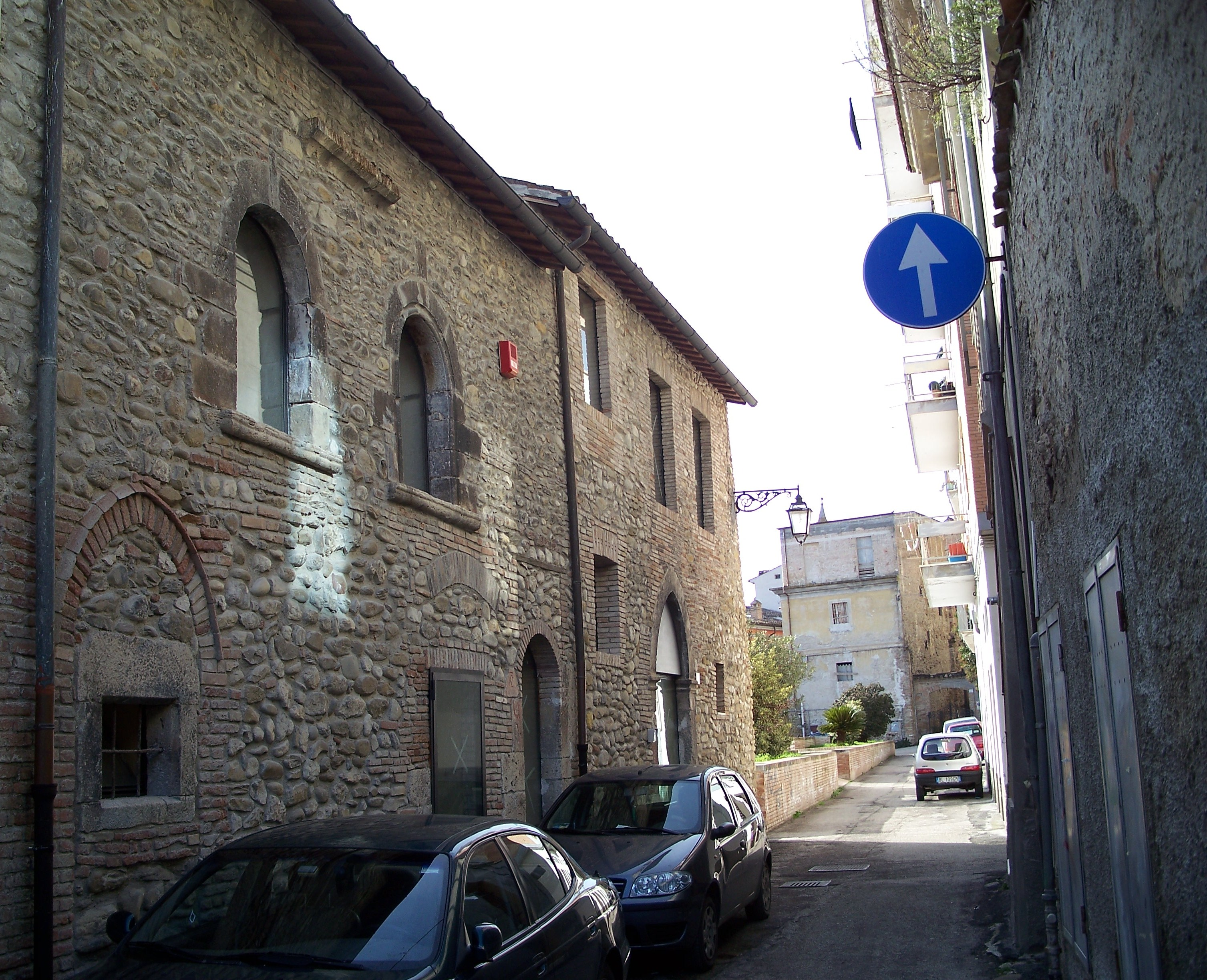 Casa Medievale Urbani - Teramo